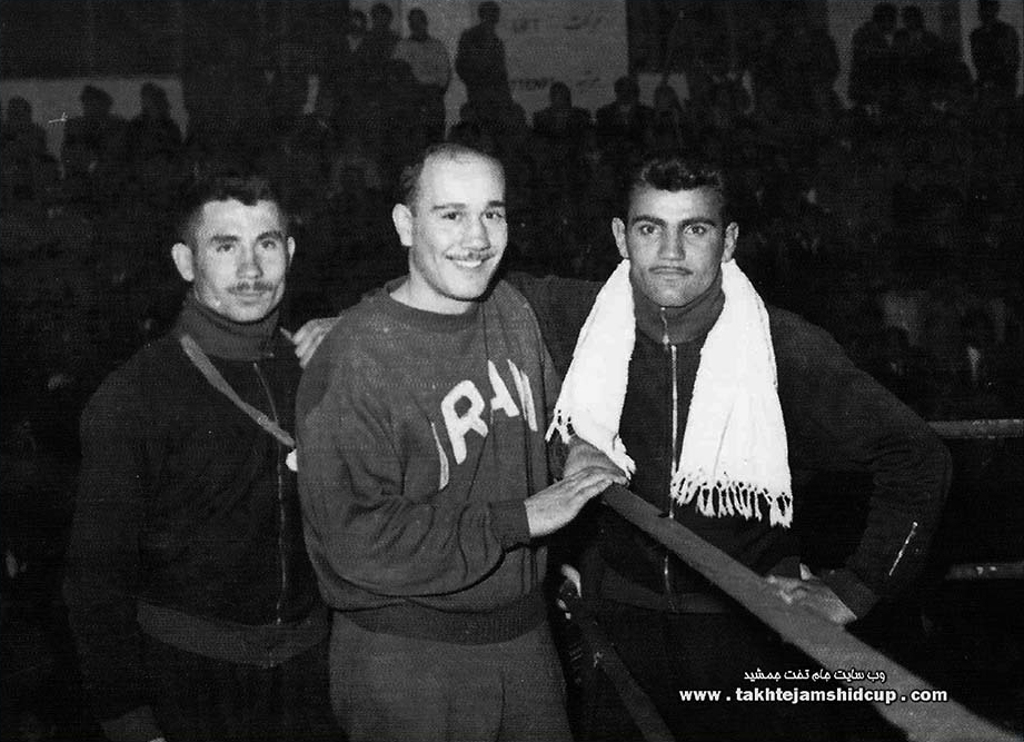 R-l: Vazik Qazarian, Petros Nazabgian, Sadegh Ali Akbarzadeh